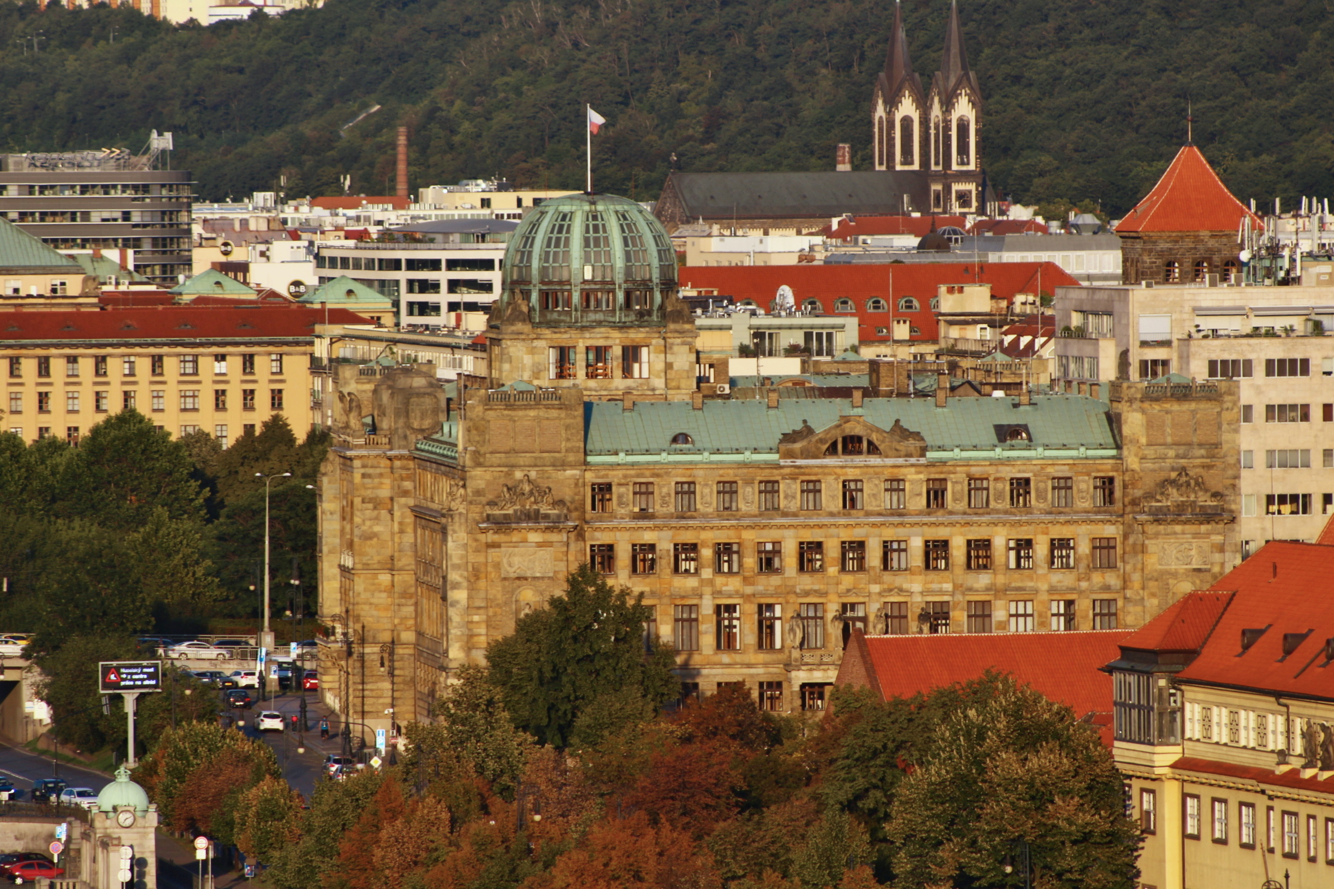 Pohled na Staré Město z Letné